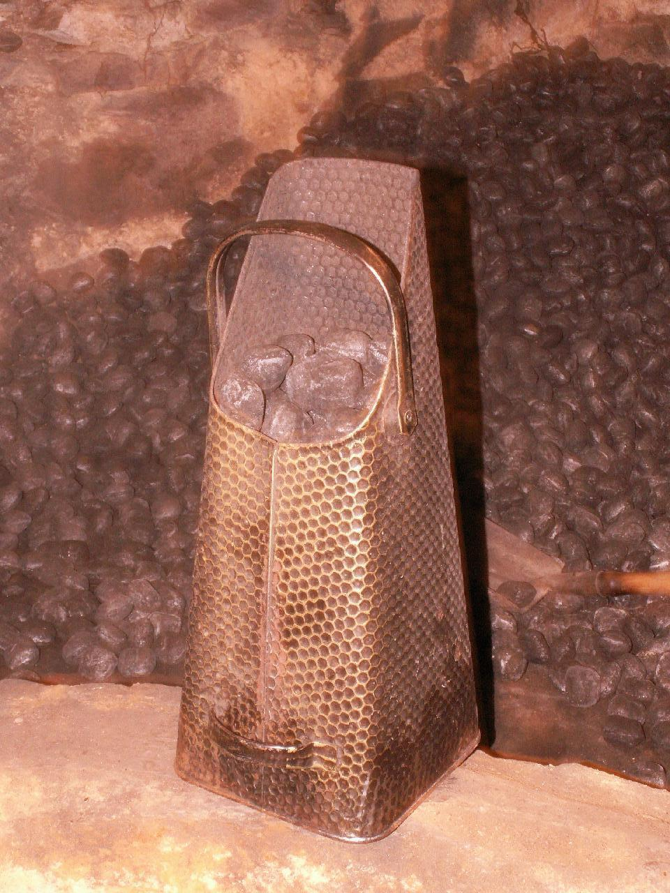 Kohleschütte